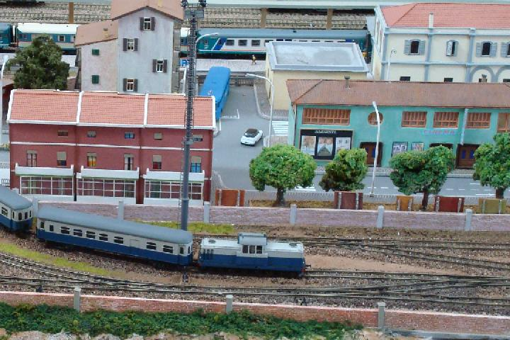 Spur H0m Ausschnitt (vorne) und Spur H0 Ausschnitt (hinten) der Modelleisenbahnanlage in der Nenngröße H0 des Museums der Ferrovie della Sardegna (FdS) in und Monserrato (Gemeinde Monserrato, Provinz Cagliari, Italien), Anfangs September 2008.